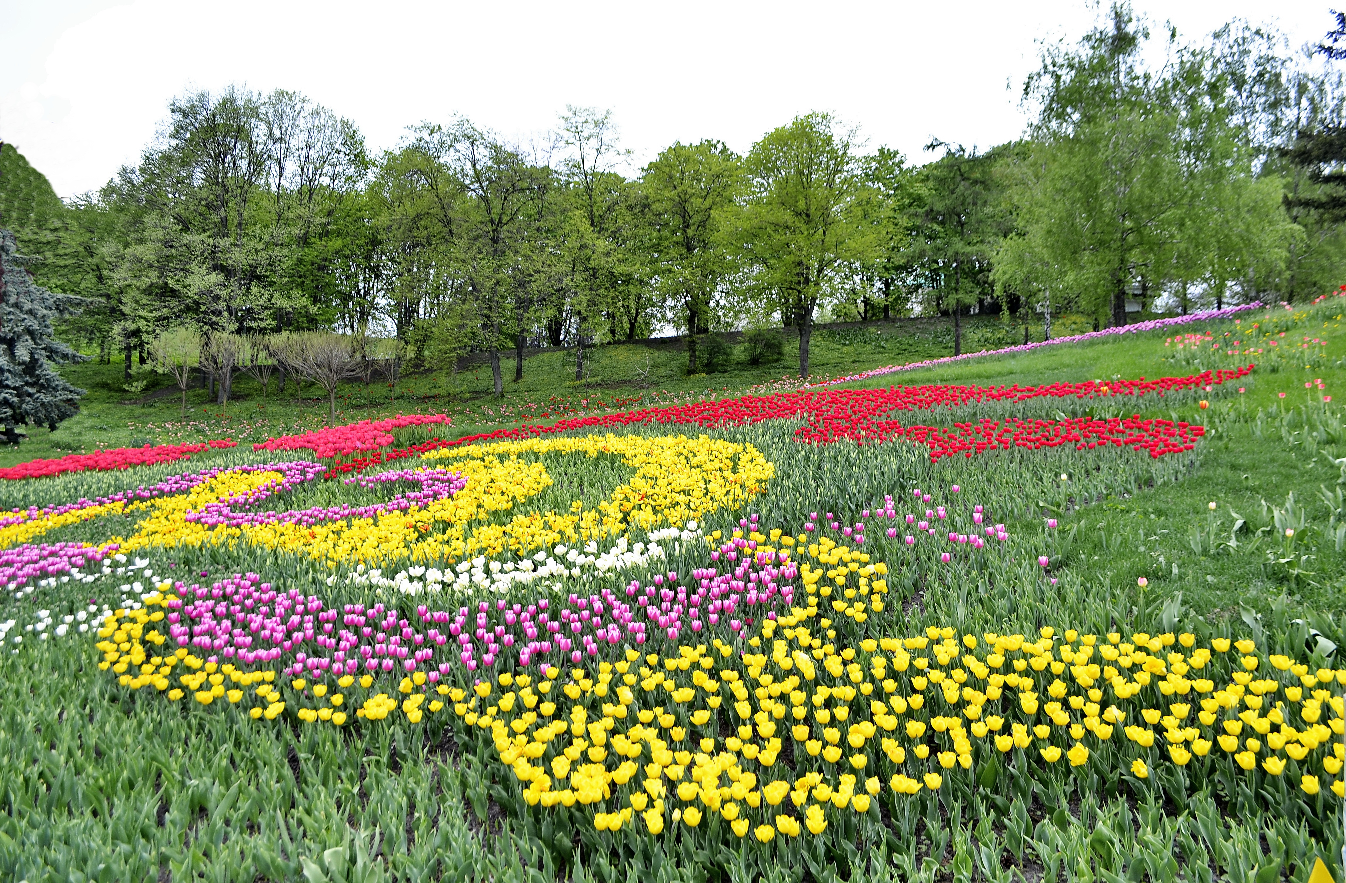 Печерський ландшафтний парк, Печерський район